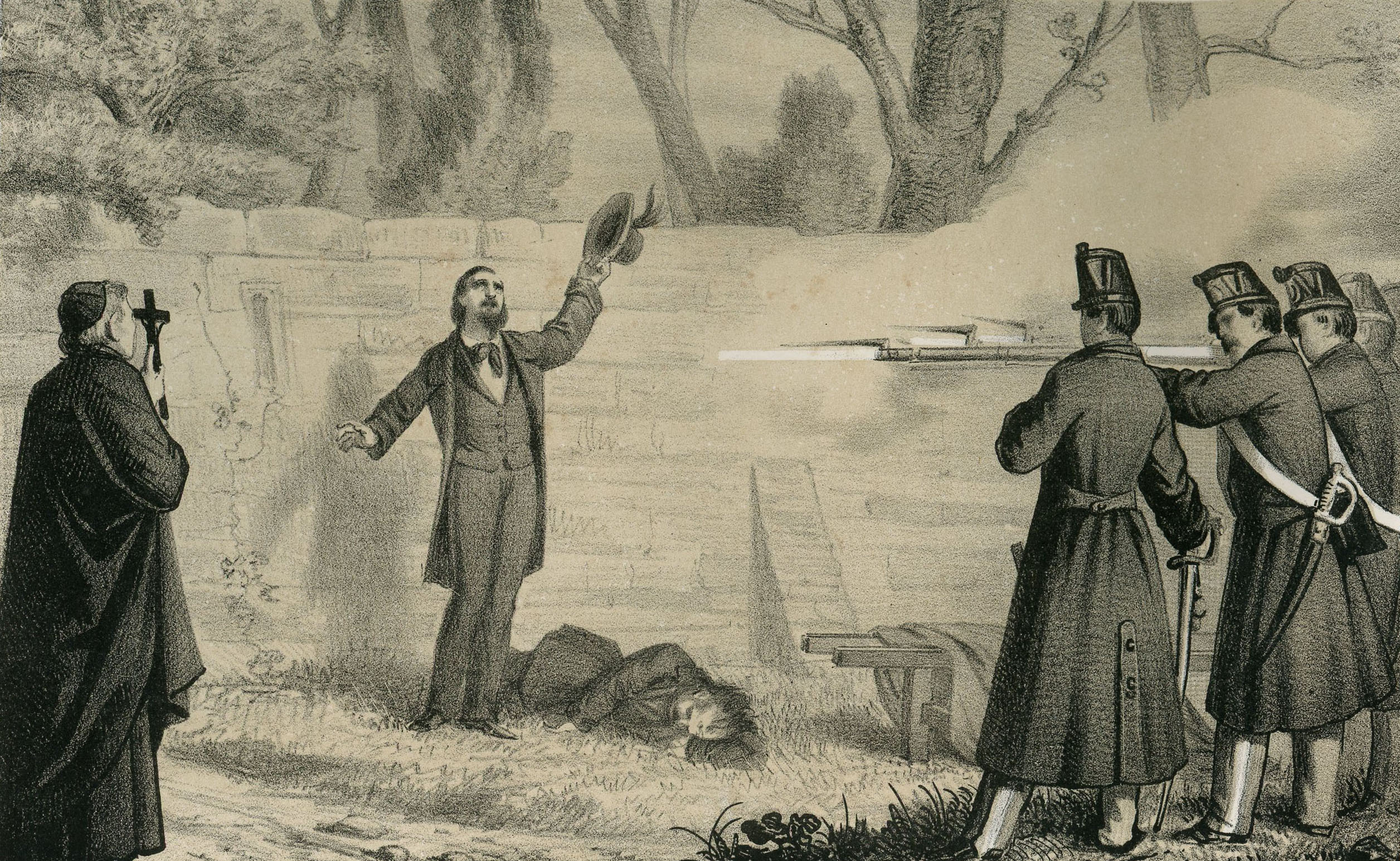 Morte dei fratelli Bandiera (litografia).